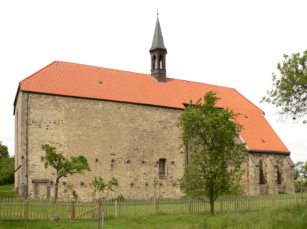 Kloster Wittenburg von Süden